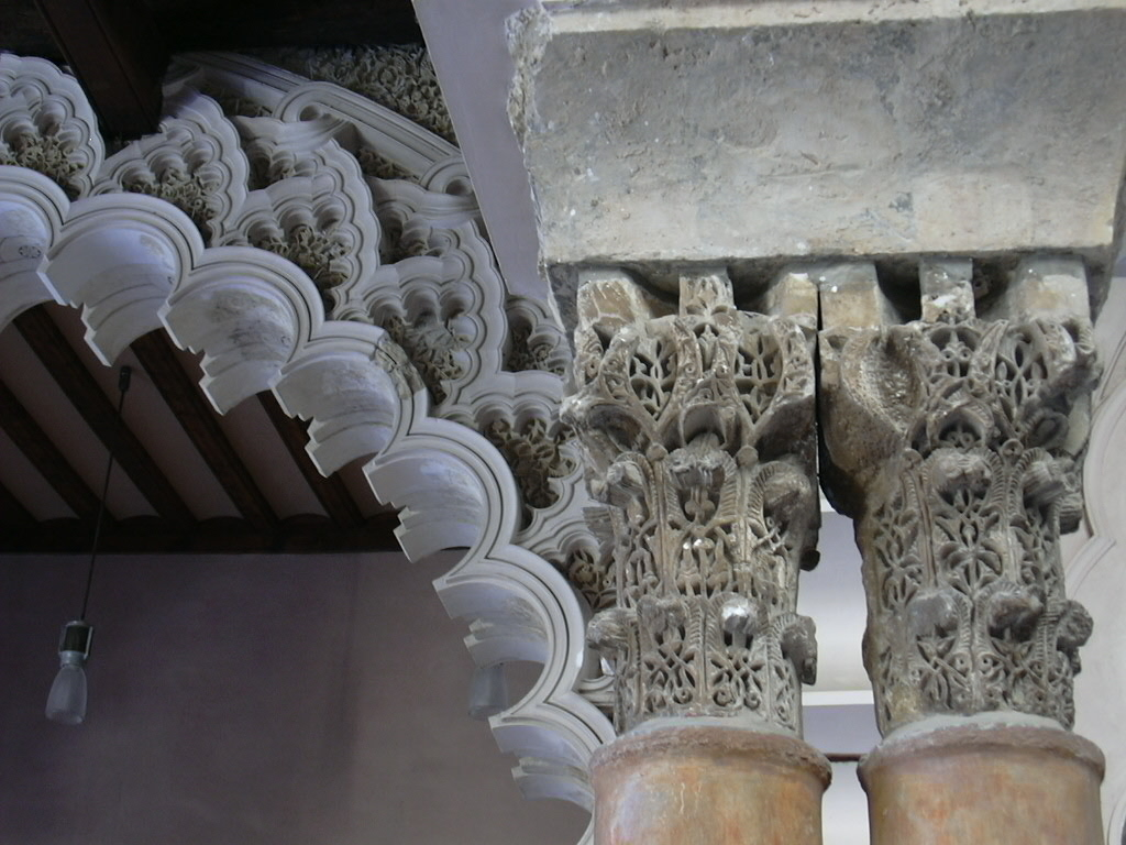 La Aljafería - Palacio taifa - Detalle